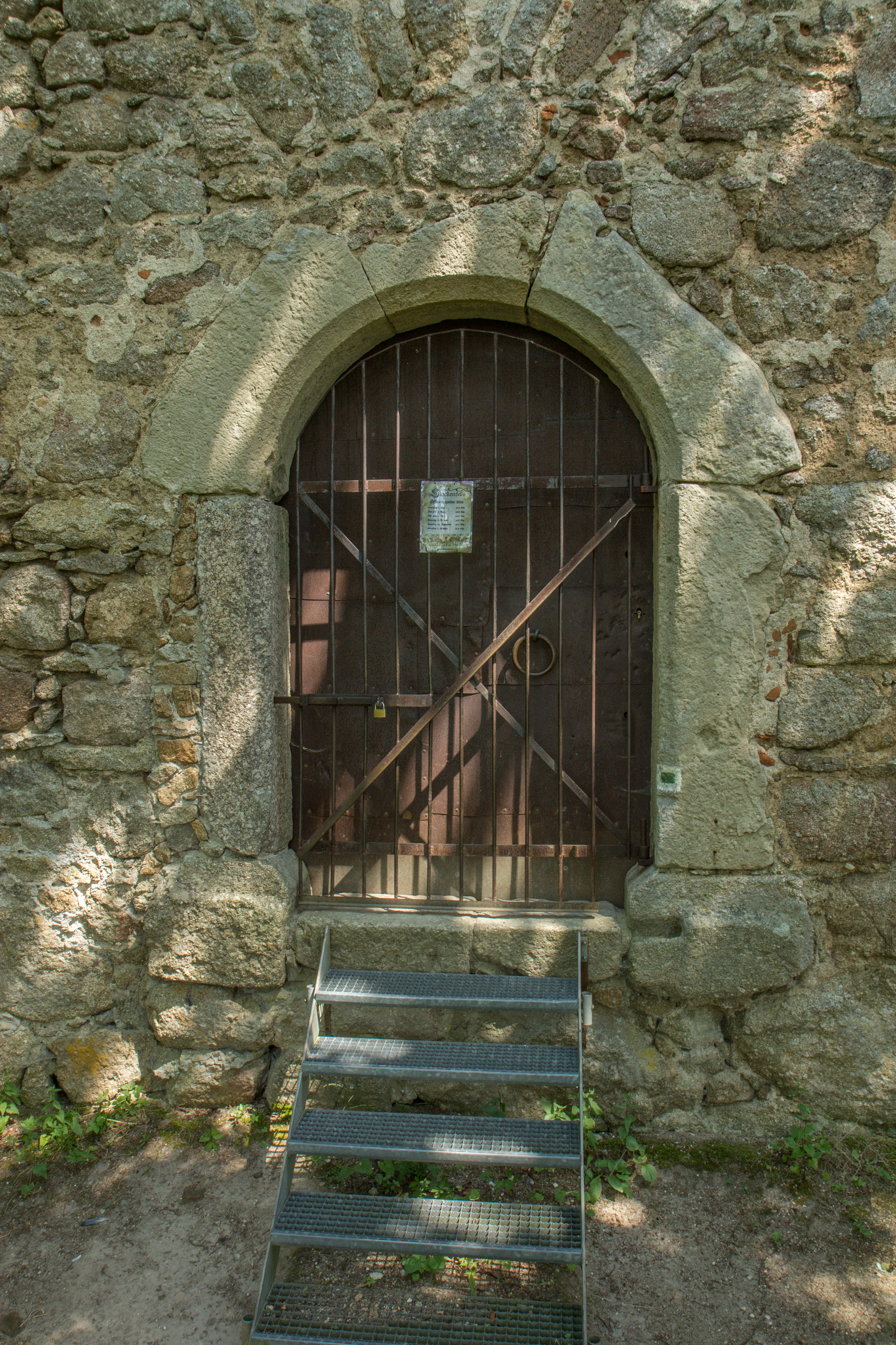 Burgtor an der Westseite der Kernburg